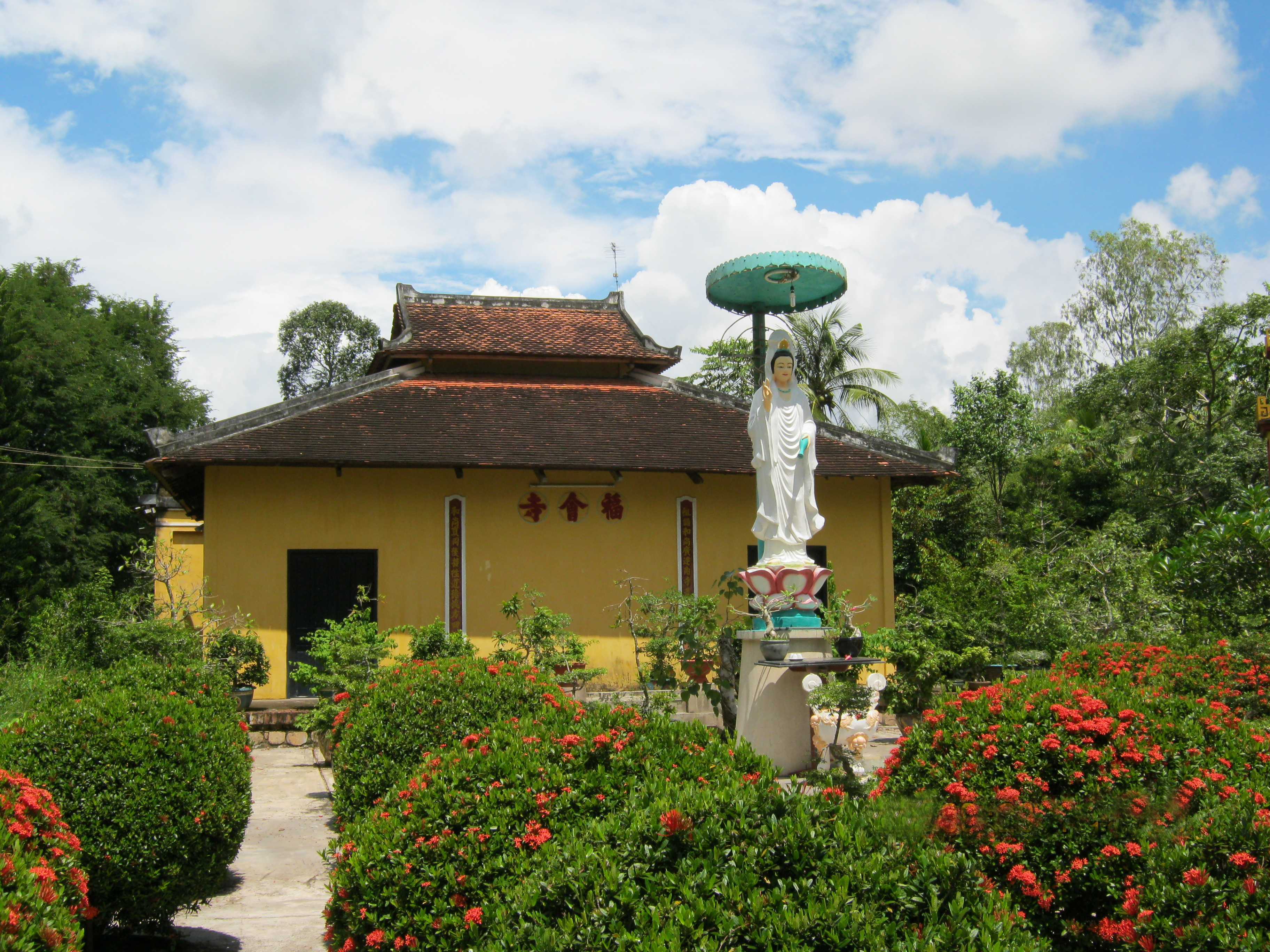 Chùa Bà Lê (Phước Hội Tự) là một di tích lịch sử cách mạng thuộc xã Hội An, huyện Chợ Mới, tỉnh An Giang (Việt Nam), đã được công nhận di tích cấp quốc gia năm 1986.